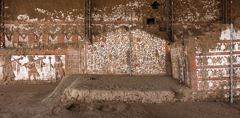 Huaca de la Luna, Trujillo, Perú. © Enrique Jara